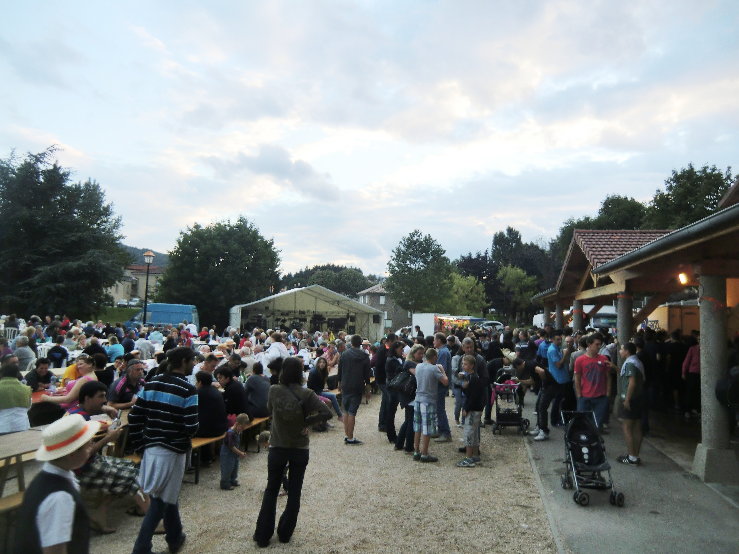 Saint-Romain d'Ay fête